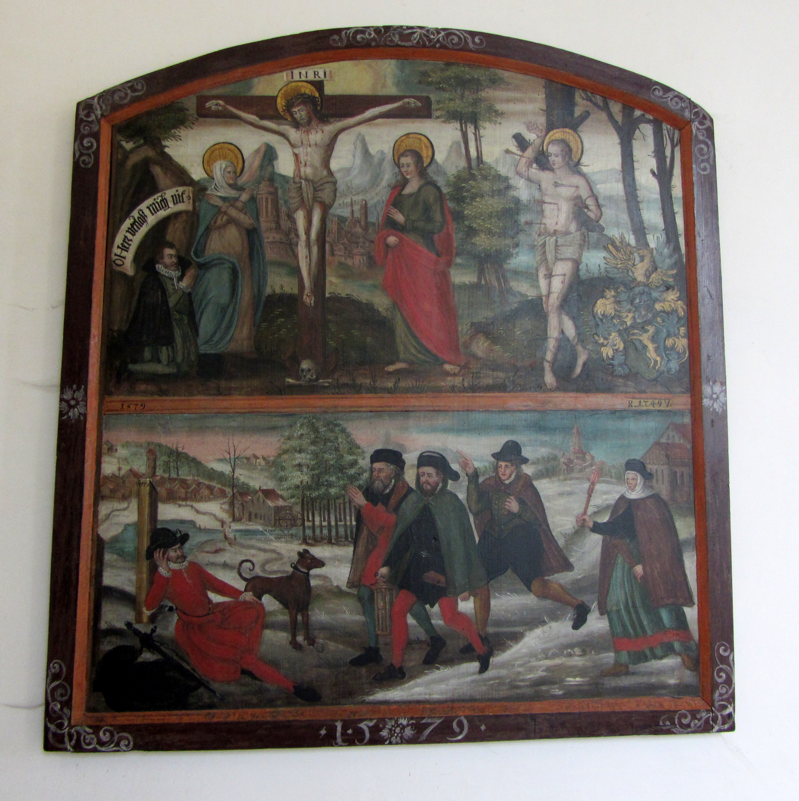 Leprosenkapelle